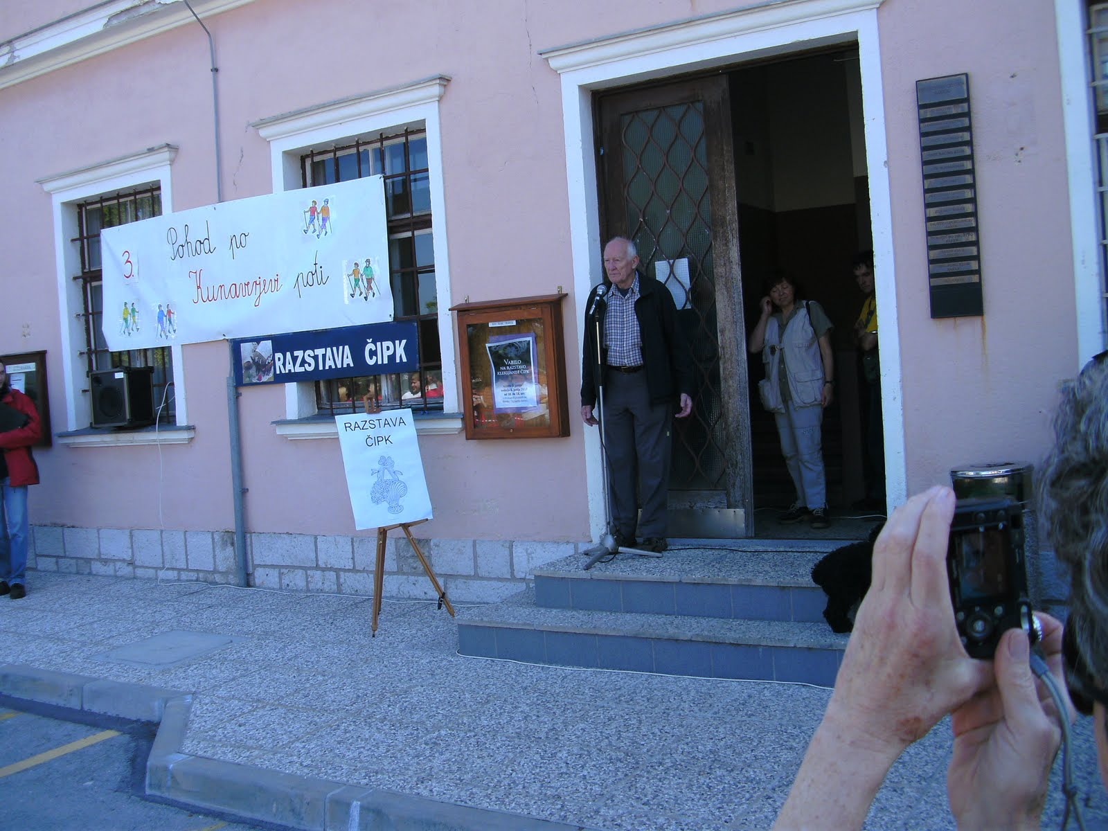 Jurij Kunaver na štartu Kunaverjevega pohoda na Rakeku.